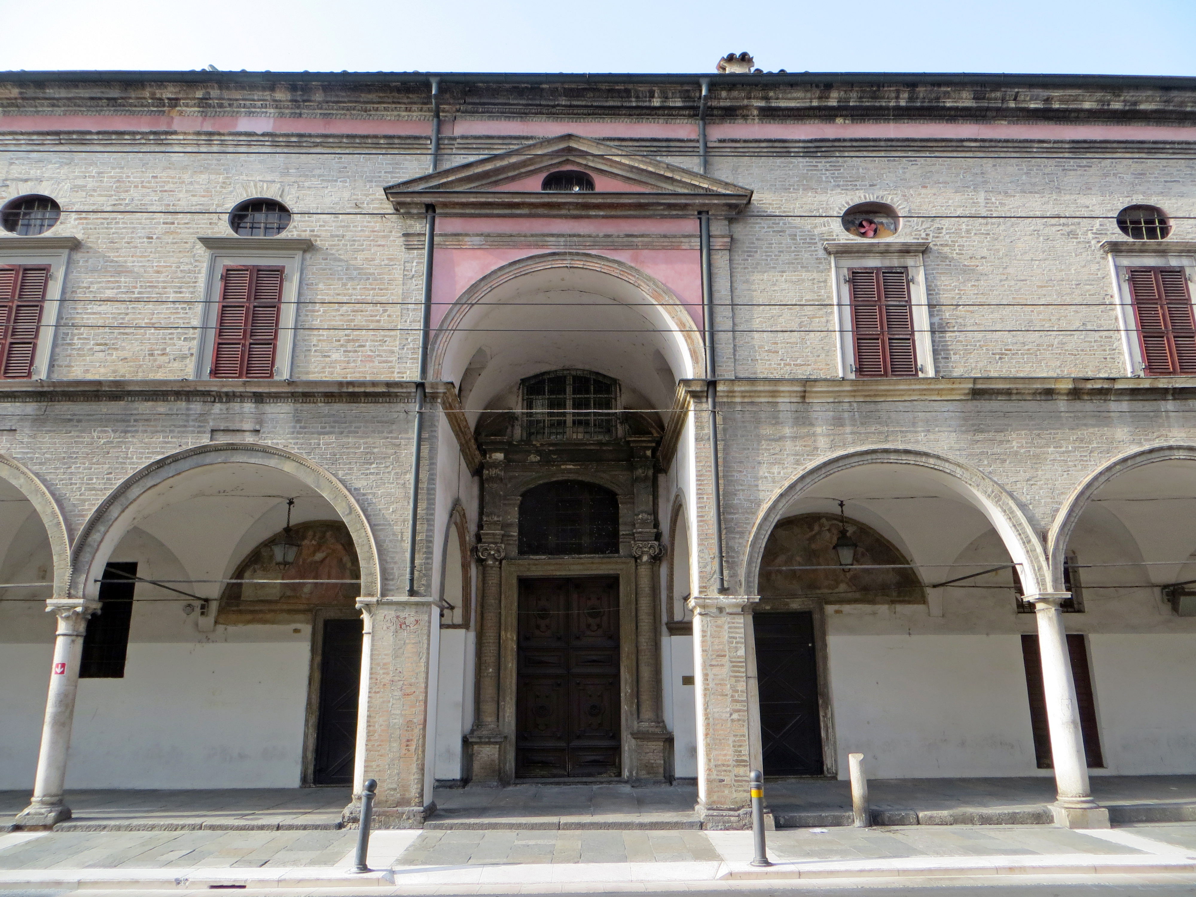 Ospedale Vecchio (Parma) - ingresso all'oratorio di Sant'Ilario